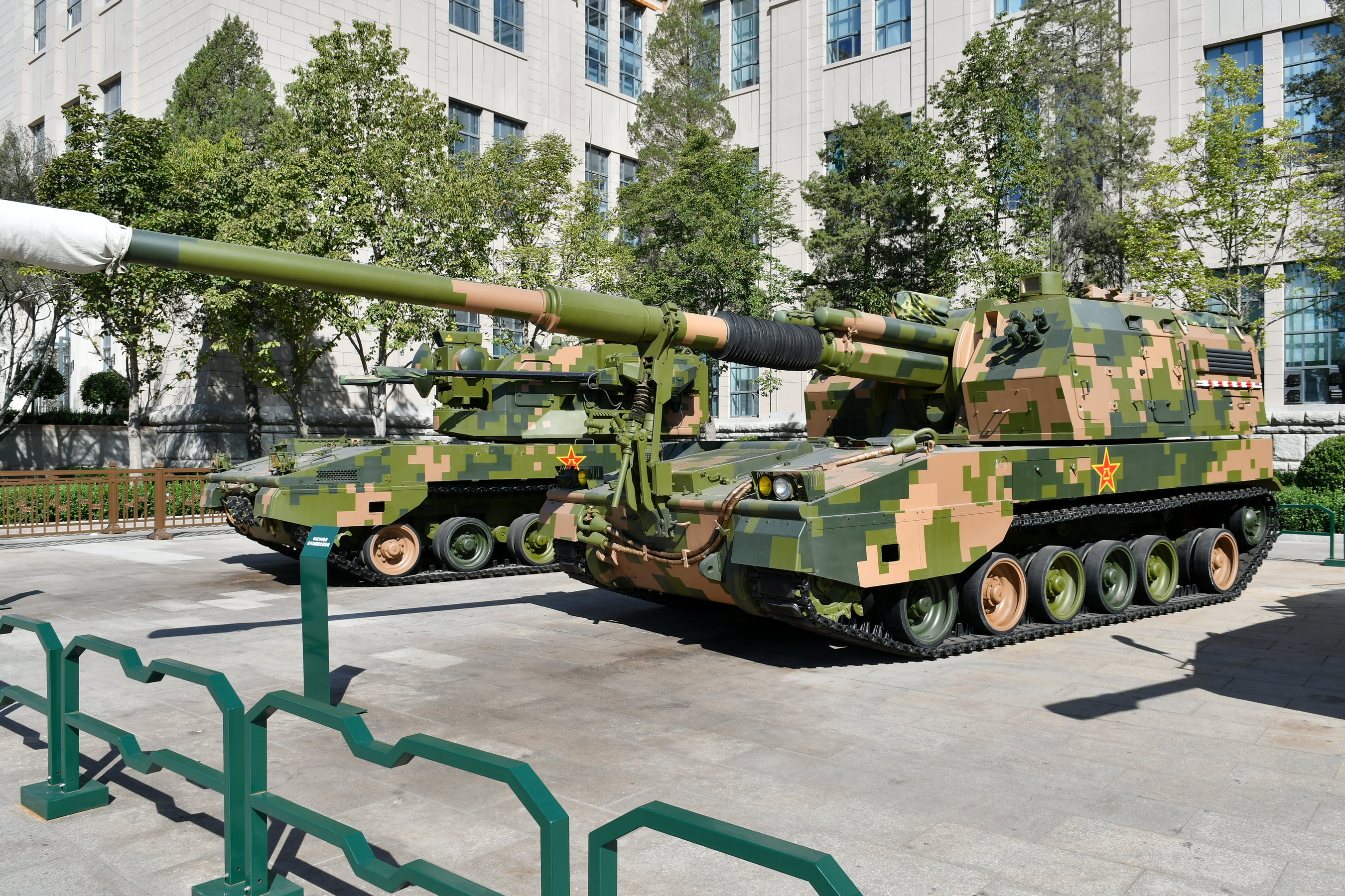 中国人民革命军事博物馆纪念中国人民解放军建军90周年主题展览展出的PLZ-05 155毫米自行加榴炮。